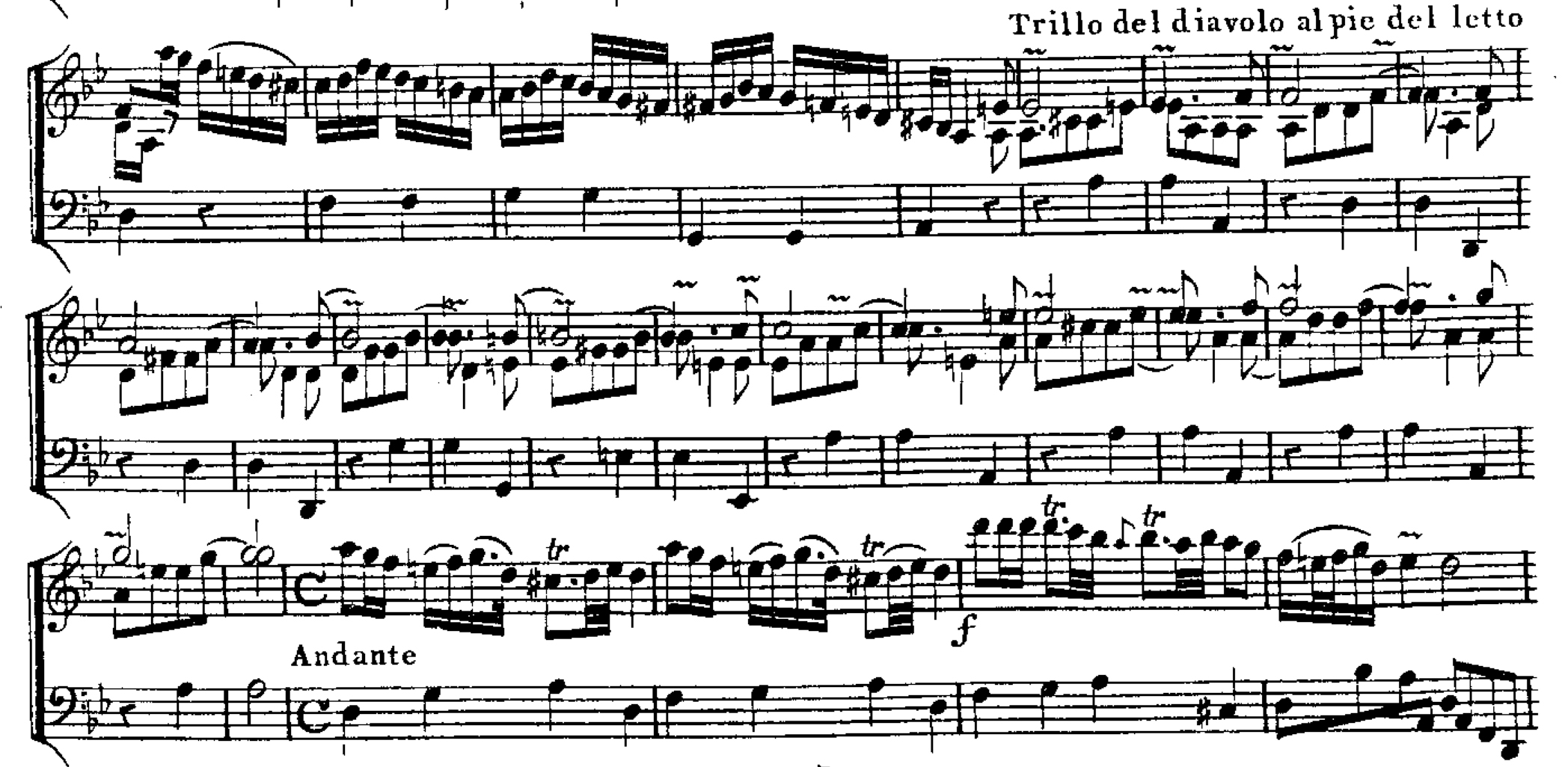 Giuseppe Tartini, Sonata in g "Le trille du diable" (devil's trill, Teufelstriller), detail. 1. edition: "L'Art du Violon" No. 140, Paris, Decombe, ca. 1799, p. 312.